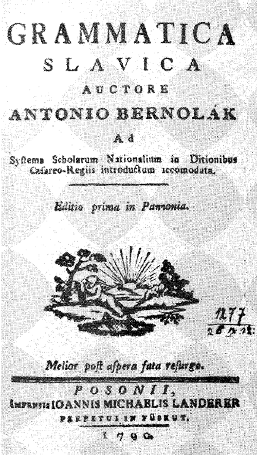 Титульная страница книги Антона Бернолака Grammatica Slavica, изданной в 1790 году.